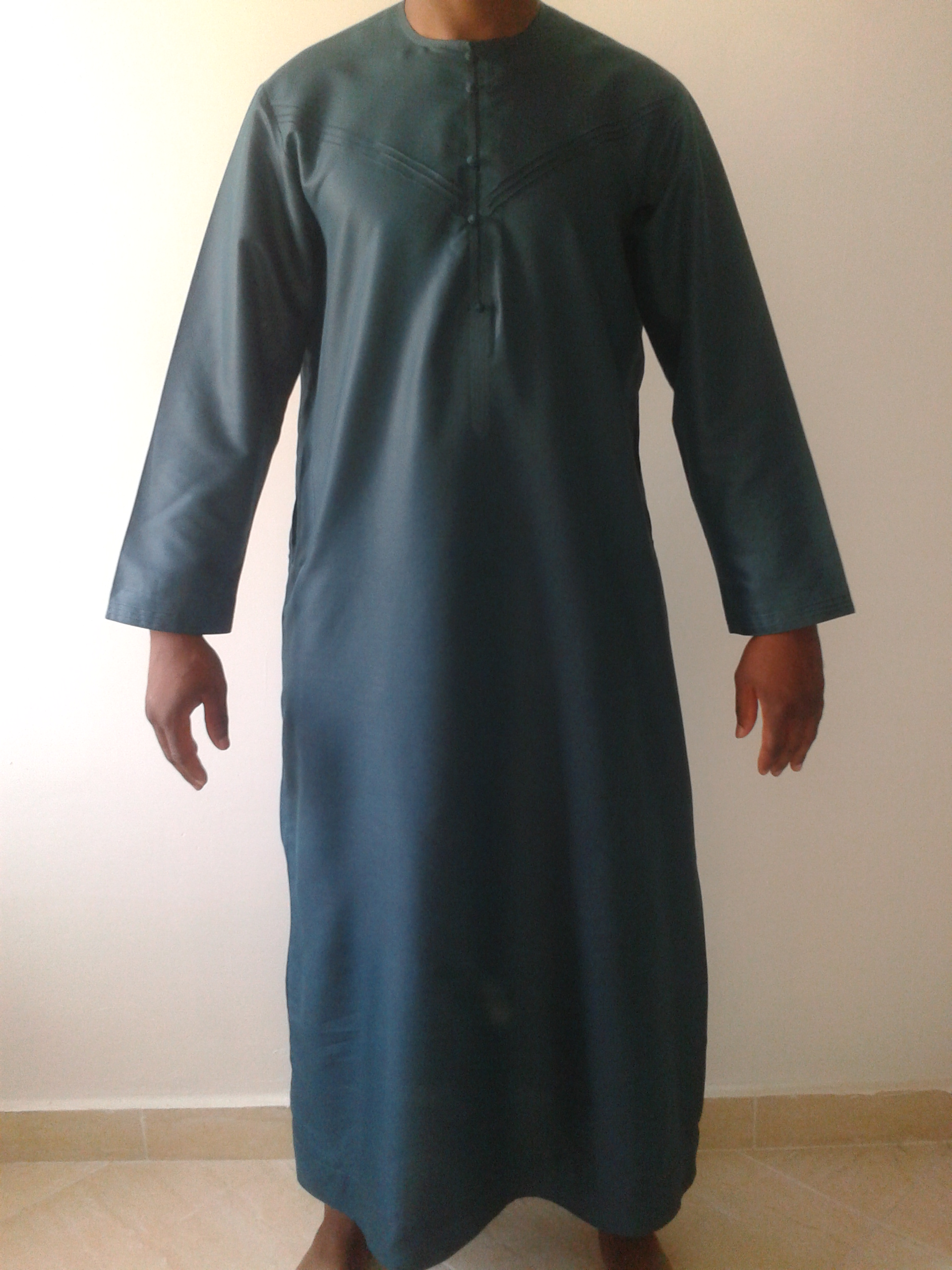 qamis émirati